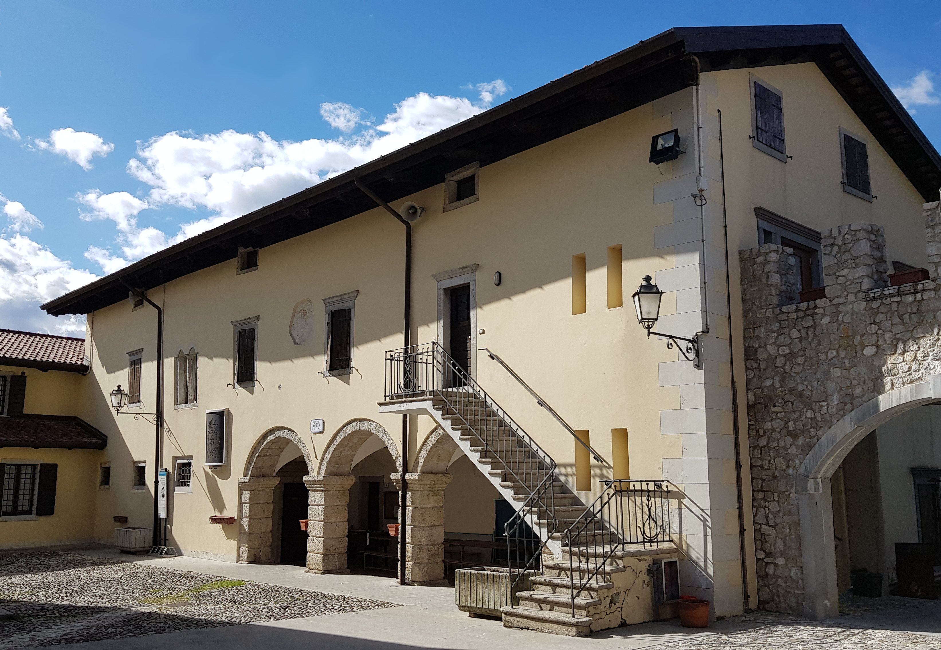 Ospedale di Santo Spirito di Ospedaletto nel 2020 Ospedaletto di Gemona del Friuli - Italia